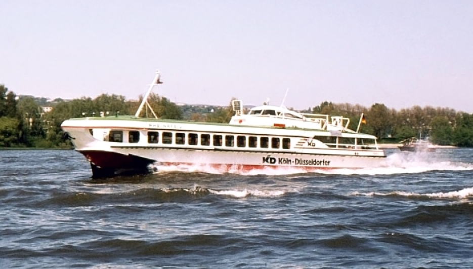 Tragflächenboot Rheinpfeil